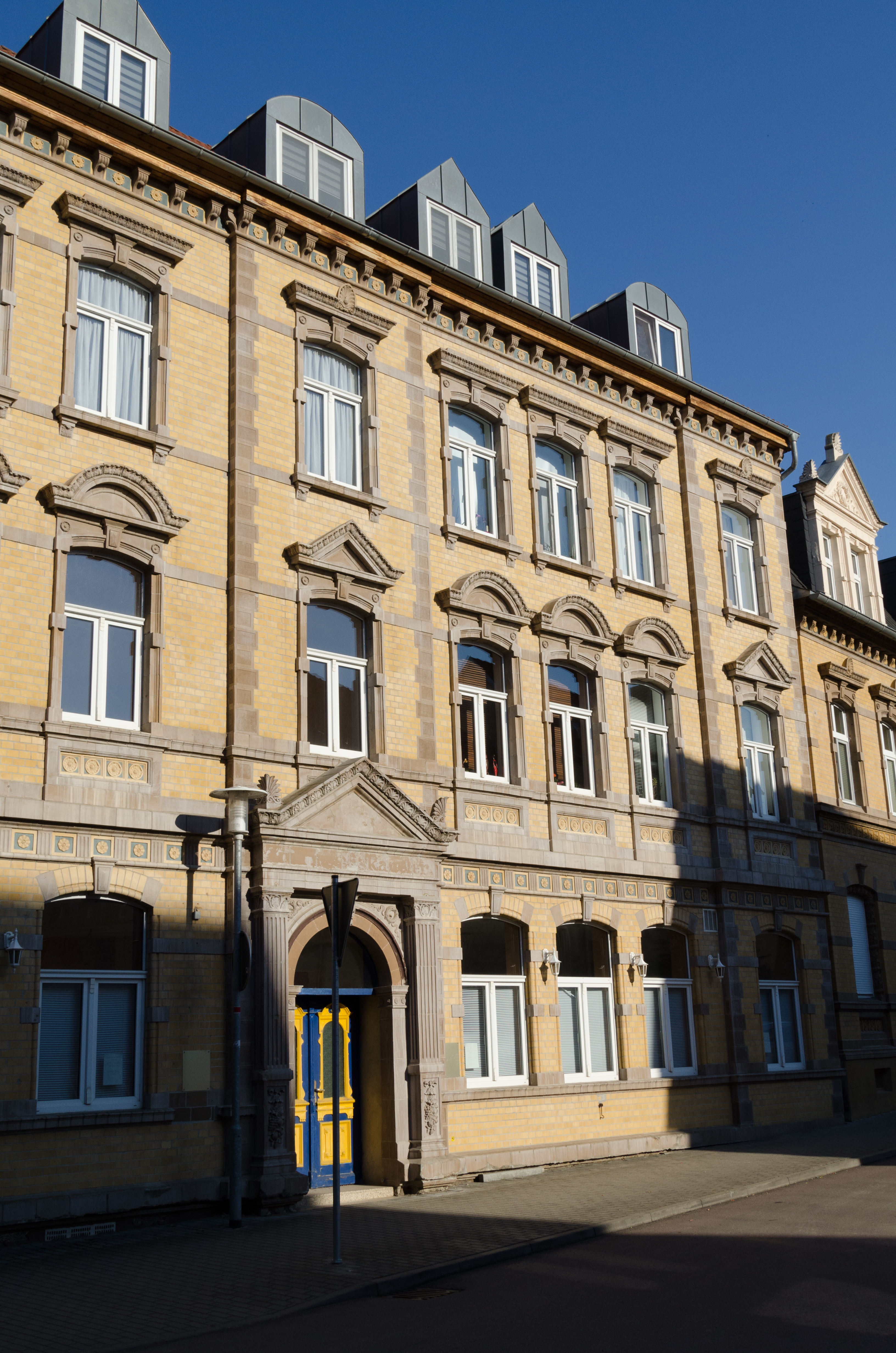 Merseburg, Hälterstraße 34